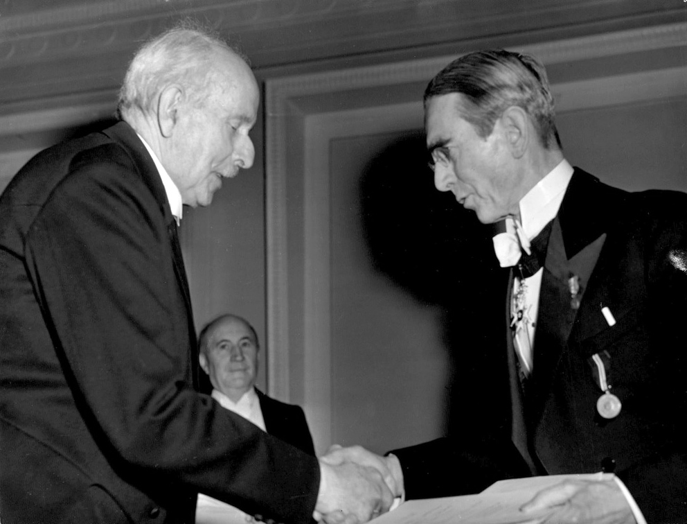 Naturvetenskapliga föreningen 80 år. Hedersledamot professor Albert Tullgren mottar sitt diplom ur ordföranden professor Gerhard Lindbloms hand.